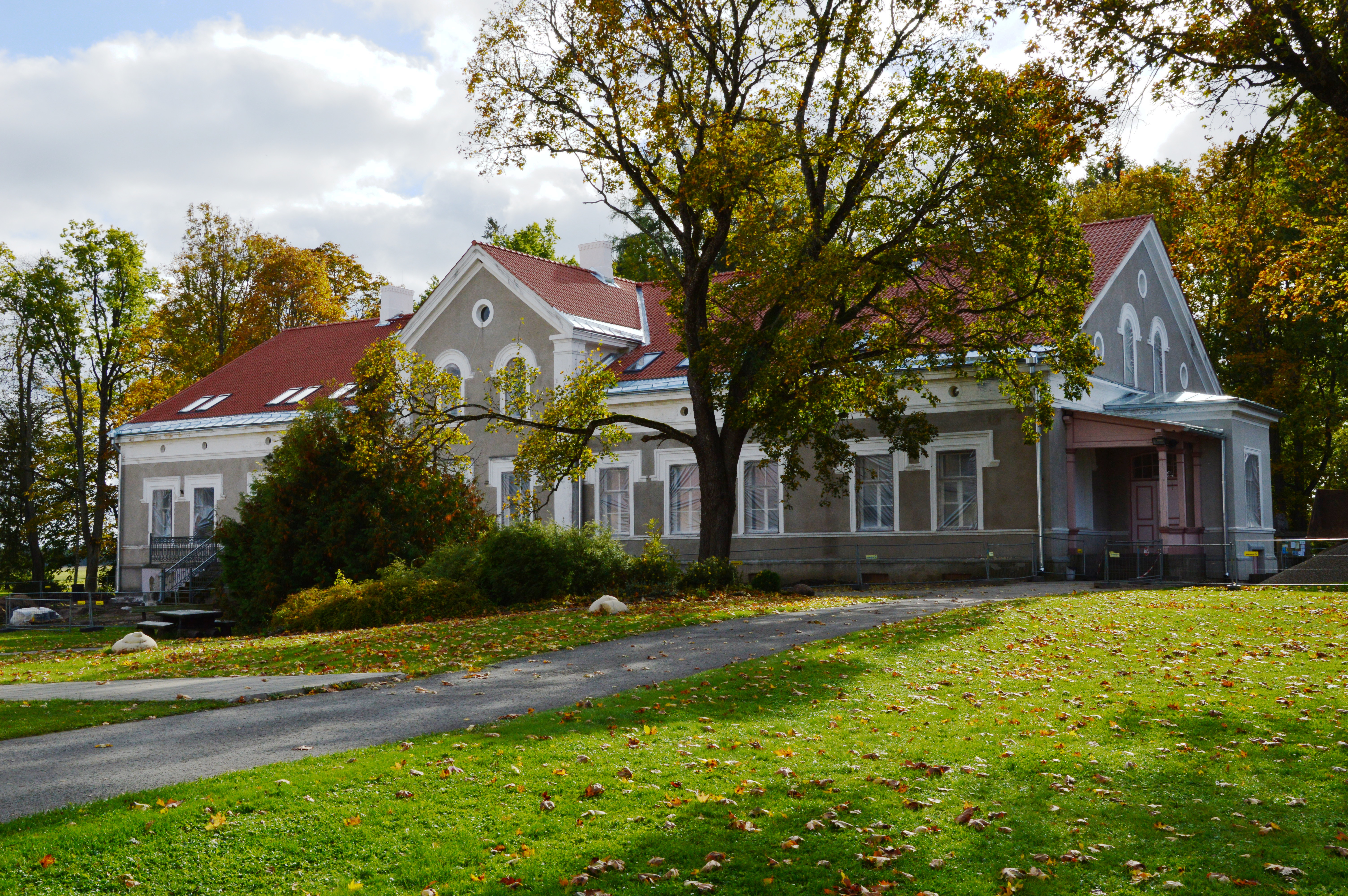 Illuka mõisa peahoone